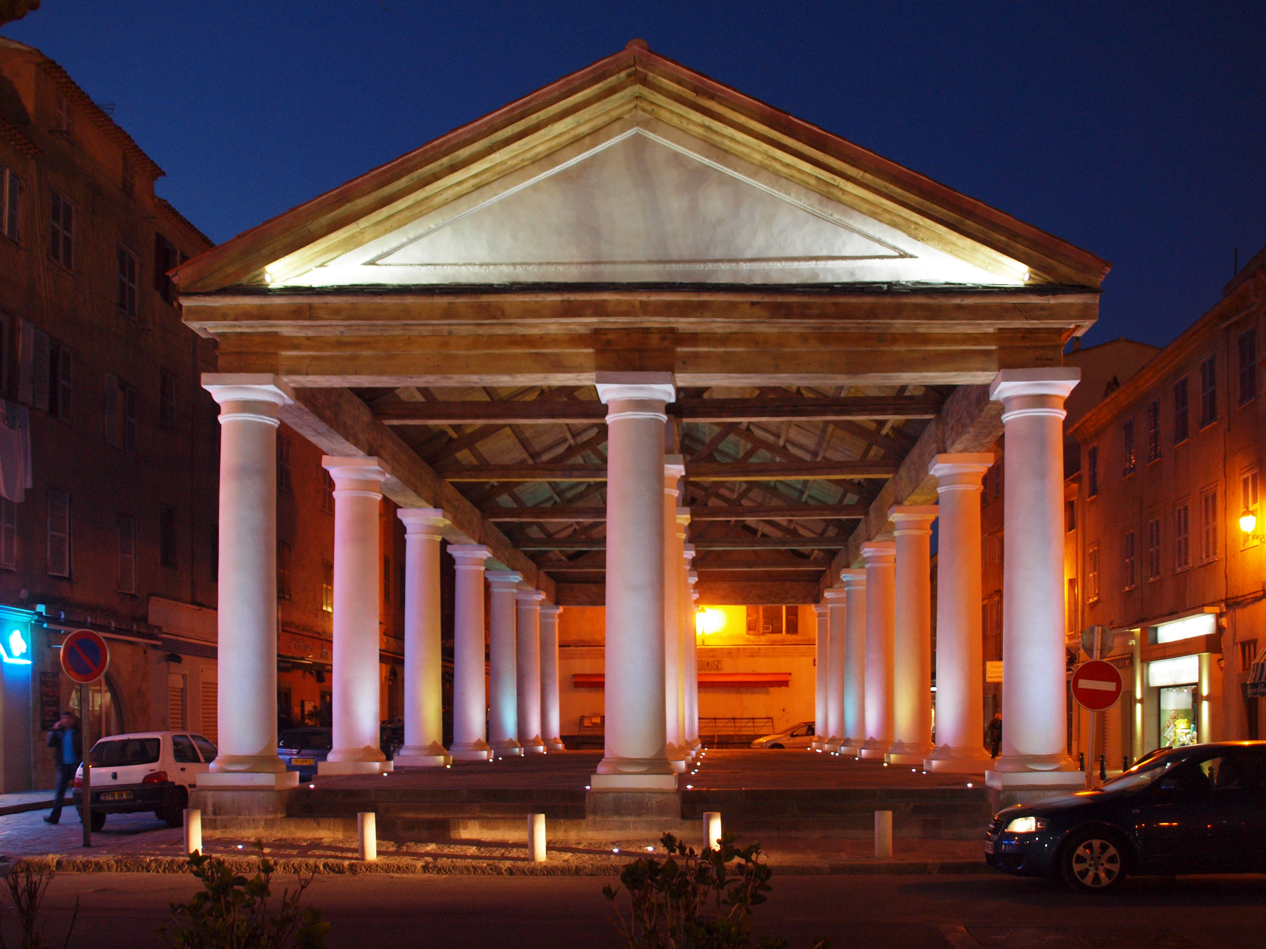 L'Île-Rousse, Balagne (Corse) - Marché couvert (classé MH) du centre ville, après restauration